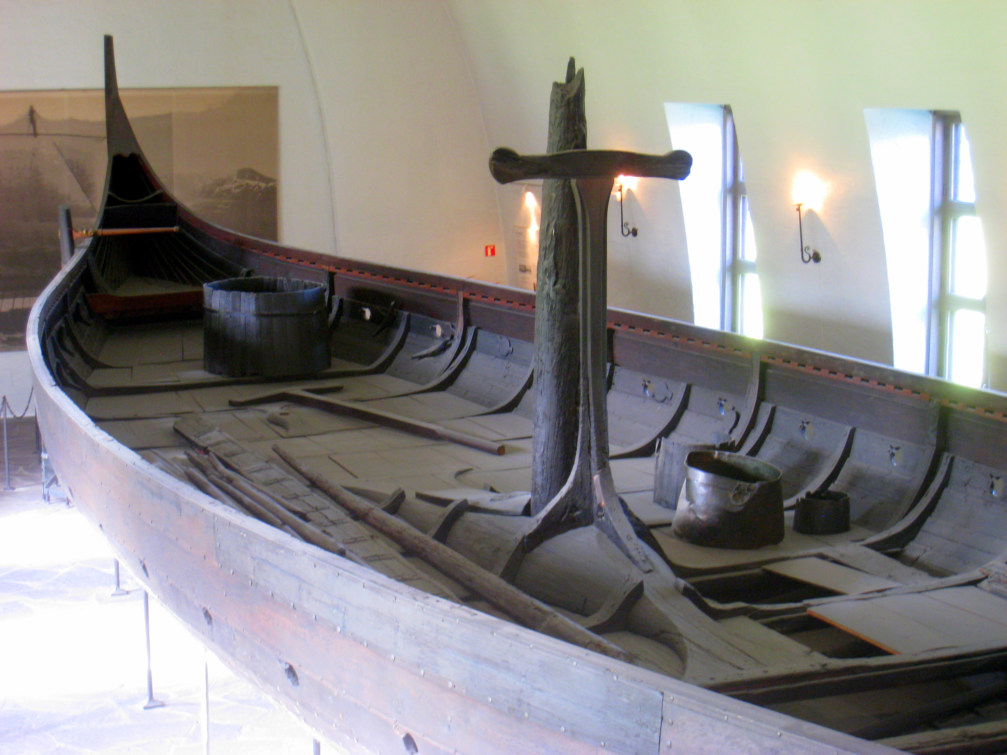 Gokstad ship, Kulturhistorisk museum (Viking Ship Museum), Oslo, Norway.